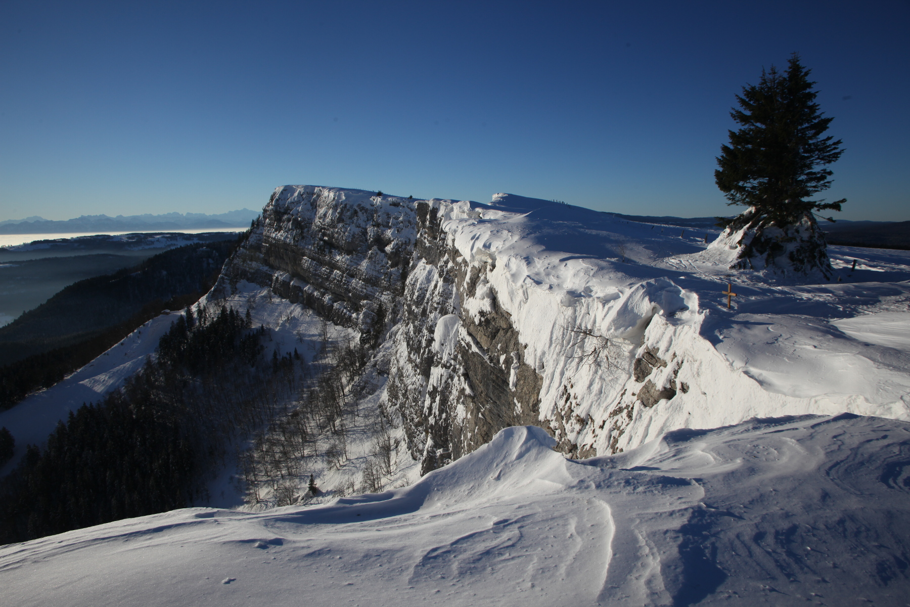 Vue de la falaise du Mont d'Or en hiver